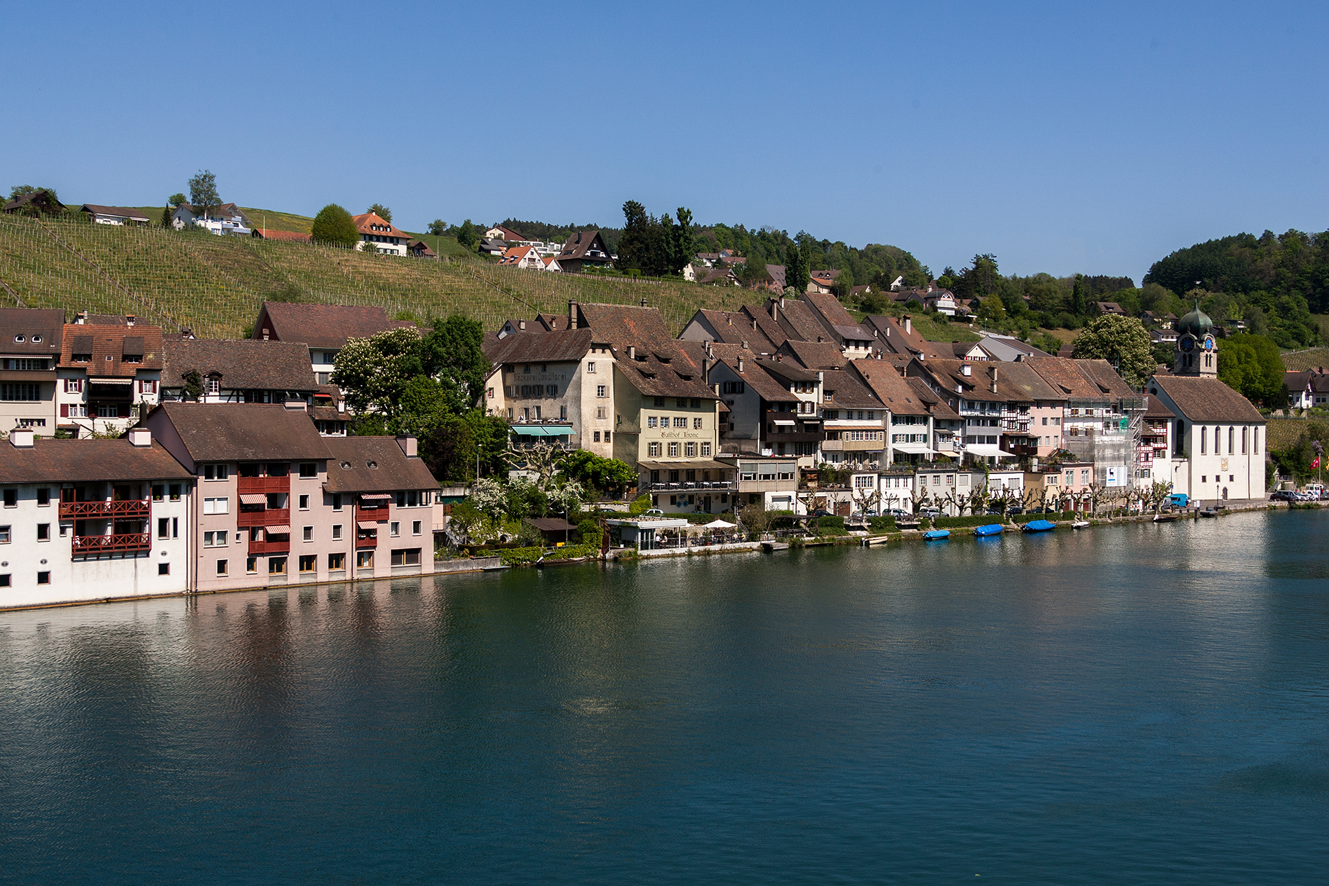 Blick auf den alten Kern von Eglisau